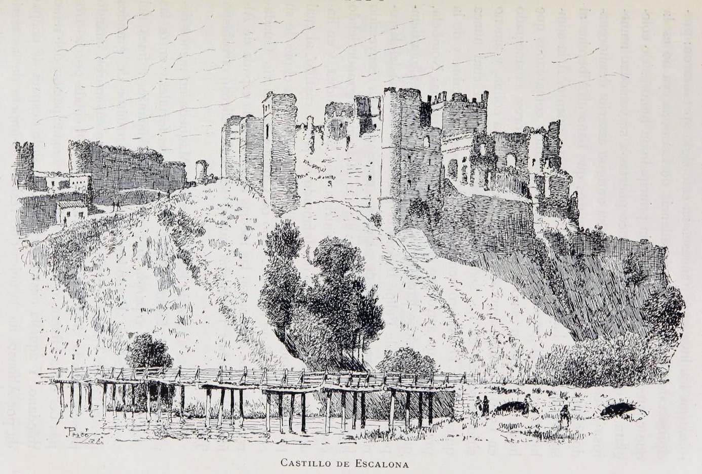 Castillo de Escalona.